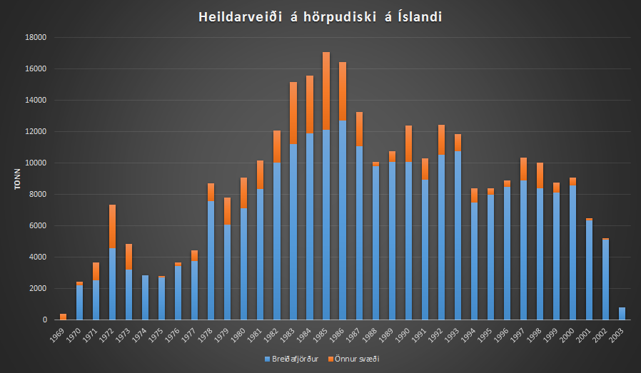 Aflatölur